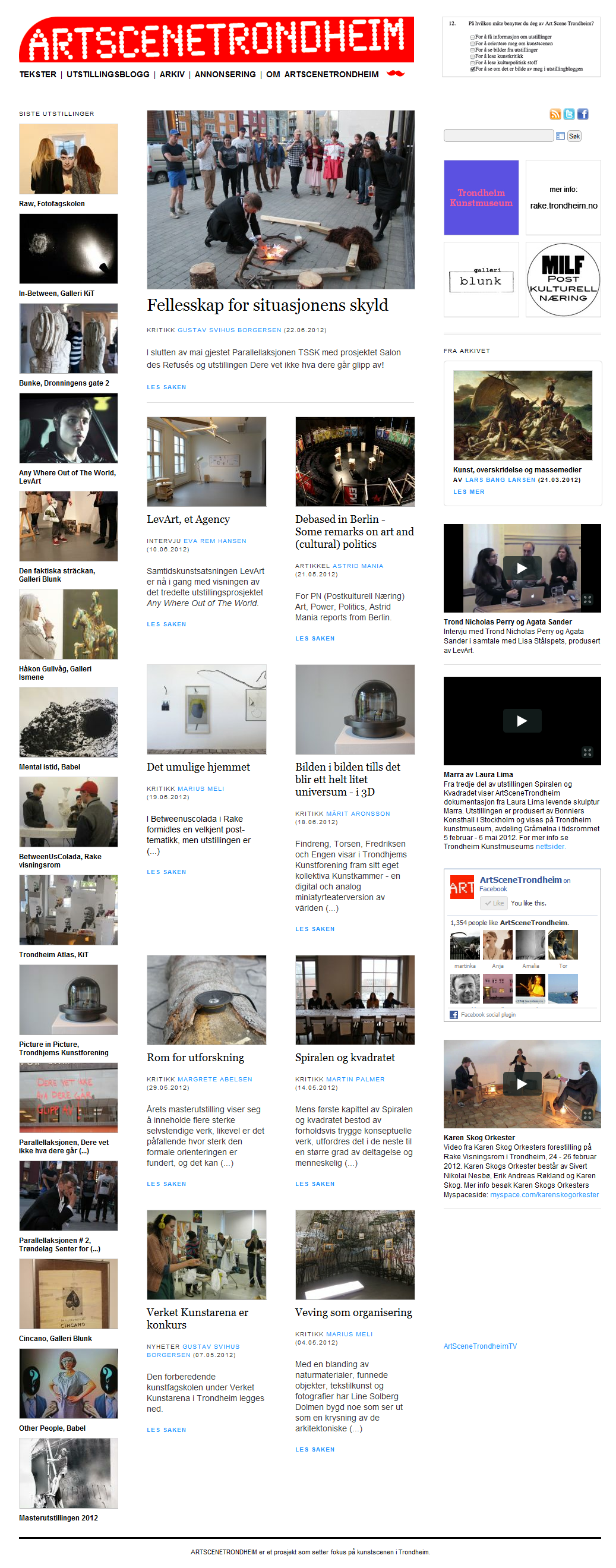 Skjermbilde av nettportalen pr juli 2012.